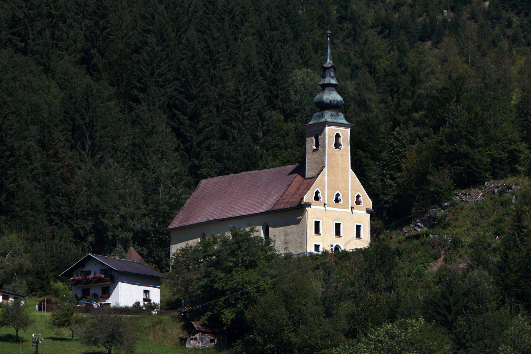 Kath. Filialkirche hl. Sebastian